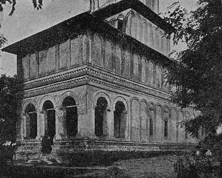 Biserica „Adormirea Maicii Domnului” din satul Balaci, județul Teleorman